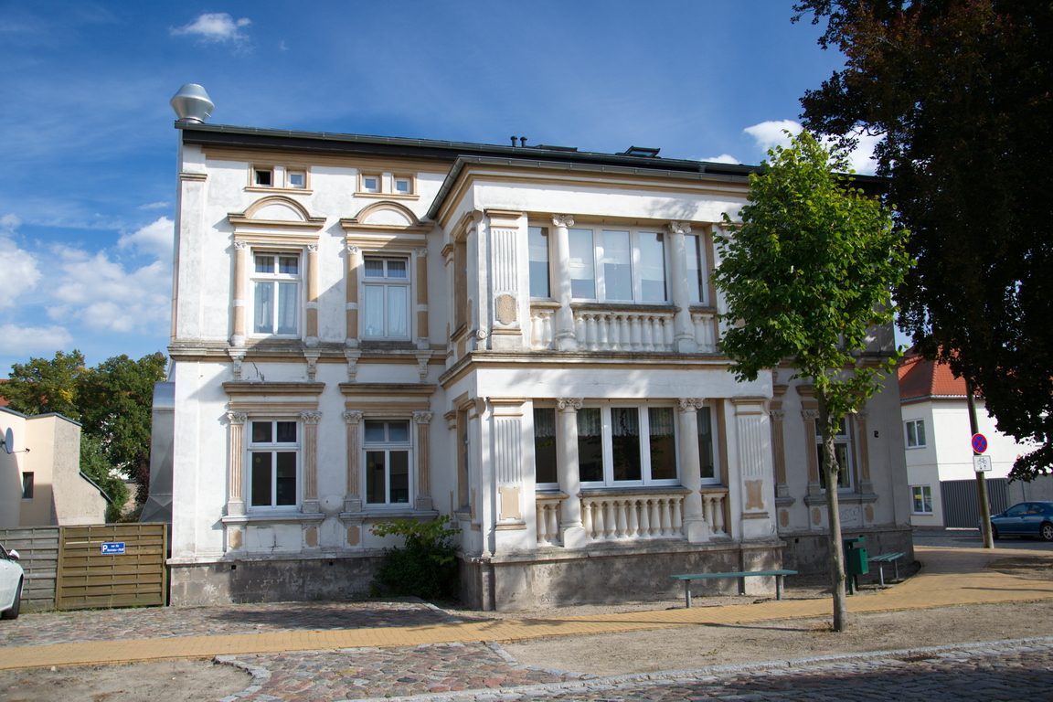 Torgelow Königsstraße Nr 2